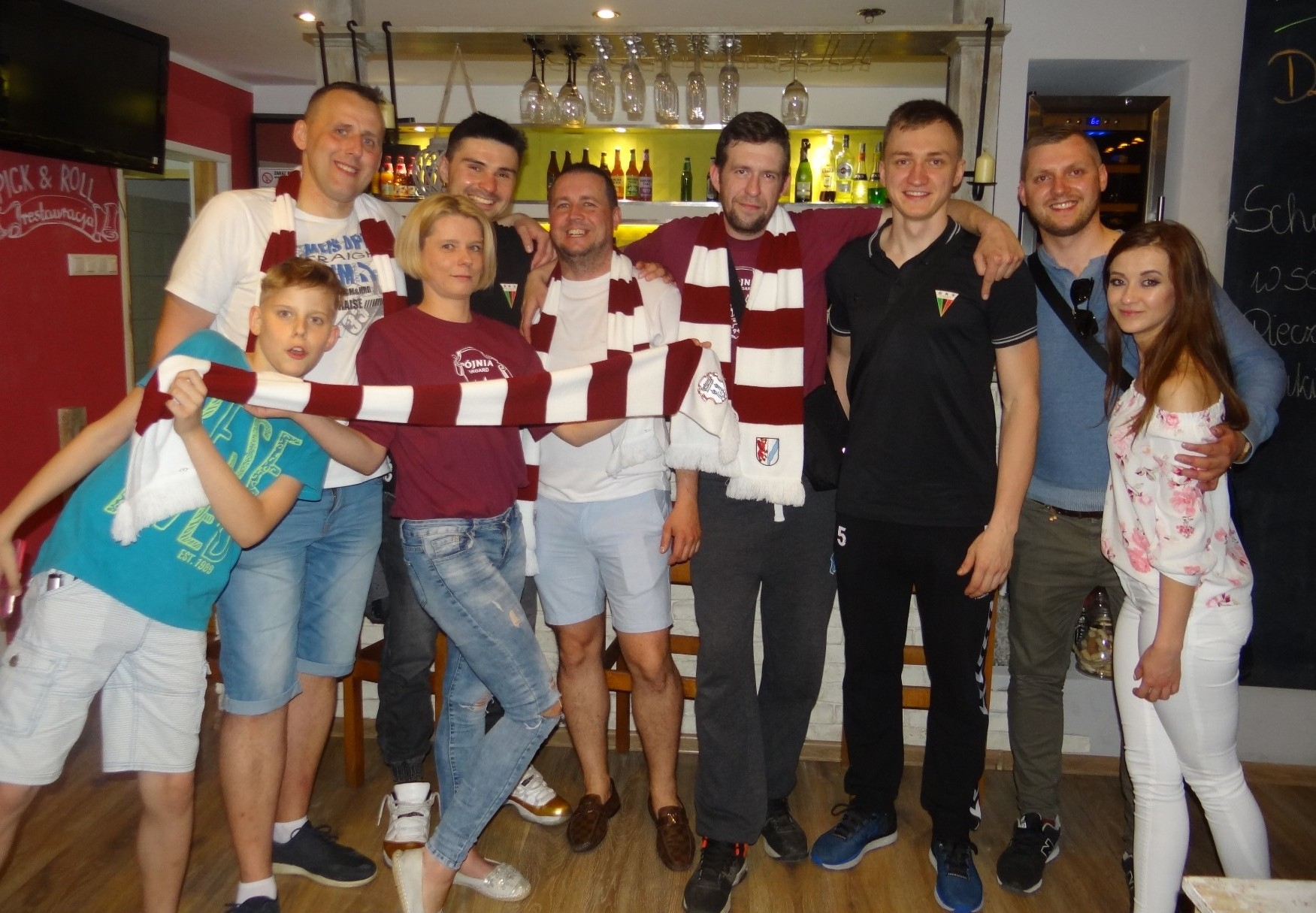 Kibice Spójni i GKS Tychy (29.04.2018)